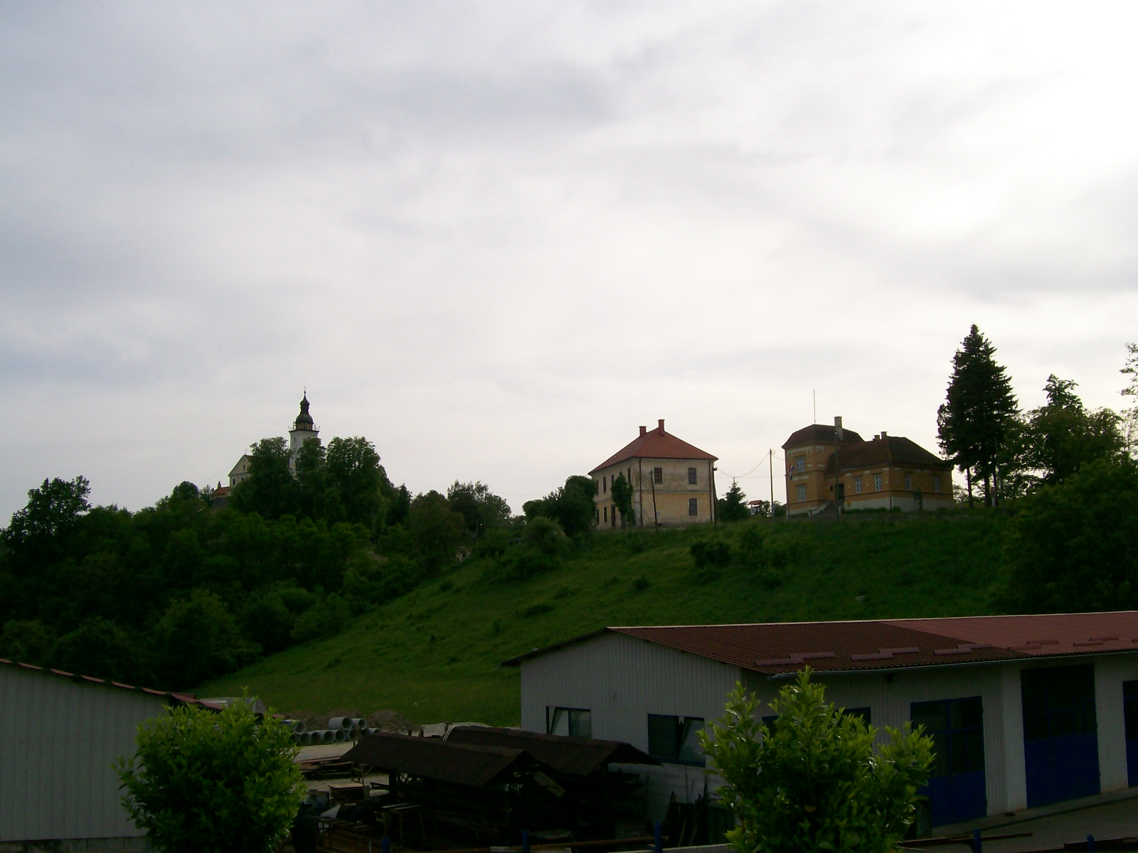 Pogled na crkvu i zgradu općine Zagorska Sela